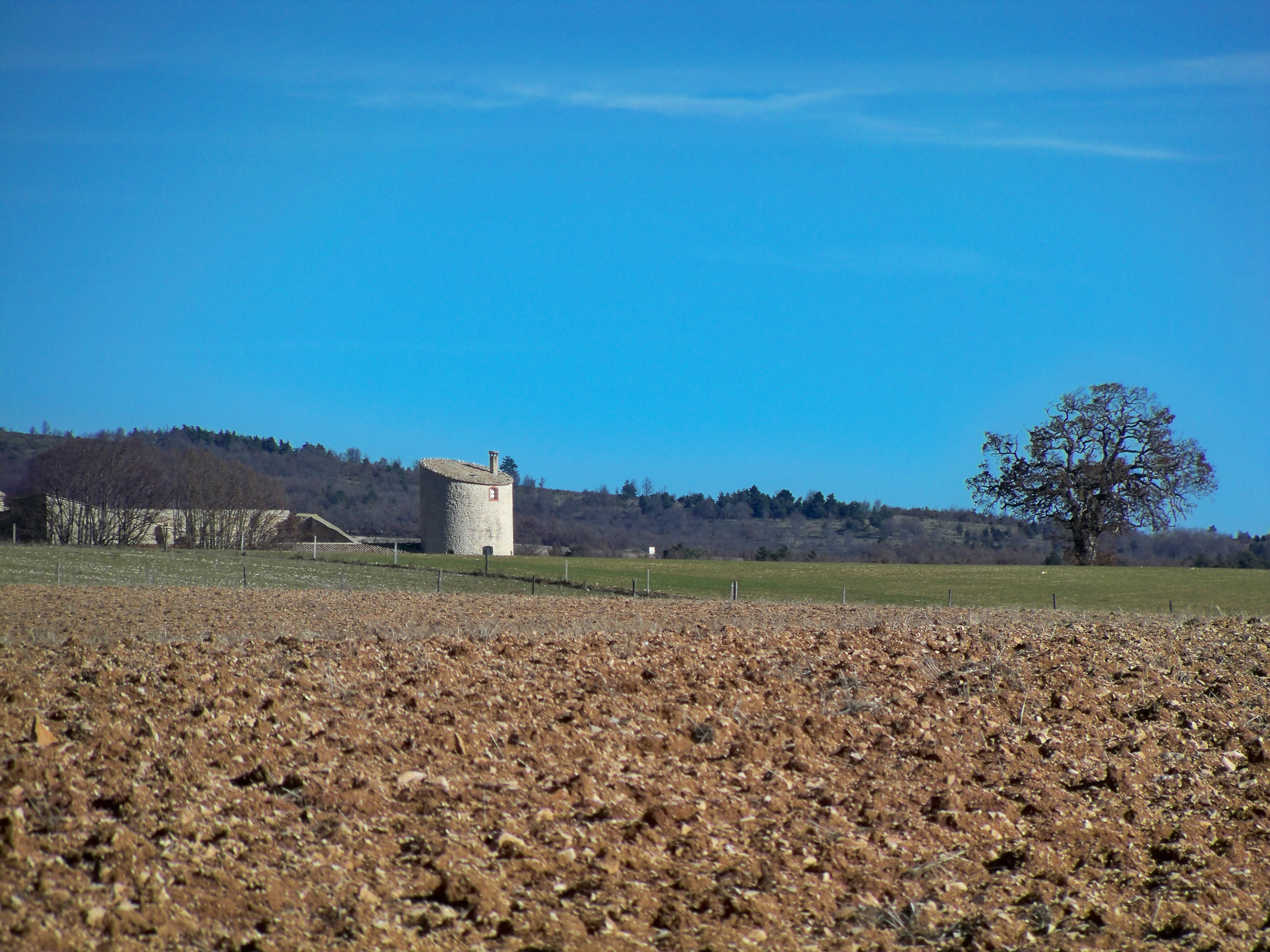 Tour près de Ferrassières, Drome, France